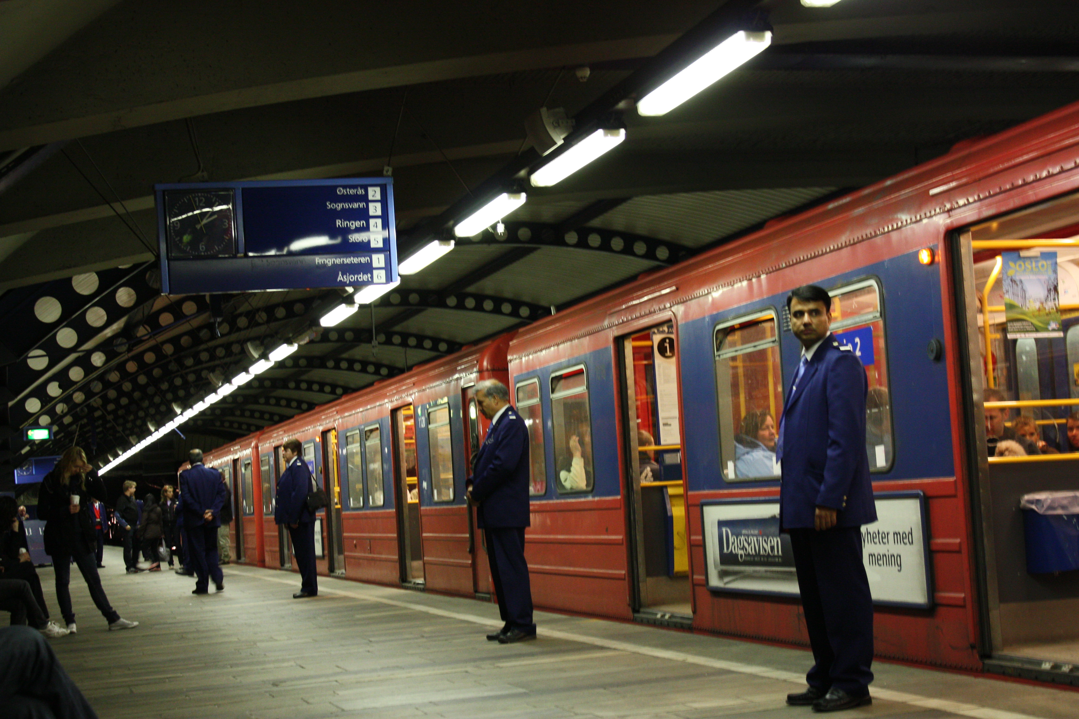 Billettkontroll på Stortinget stasjon på T-banen i Oslo.